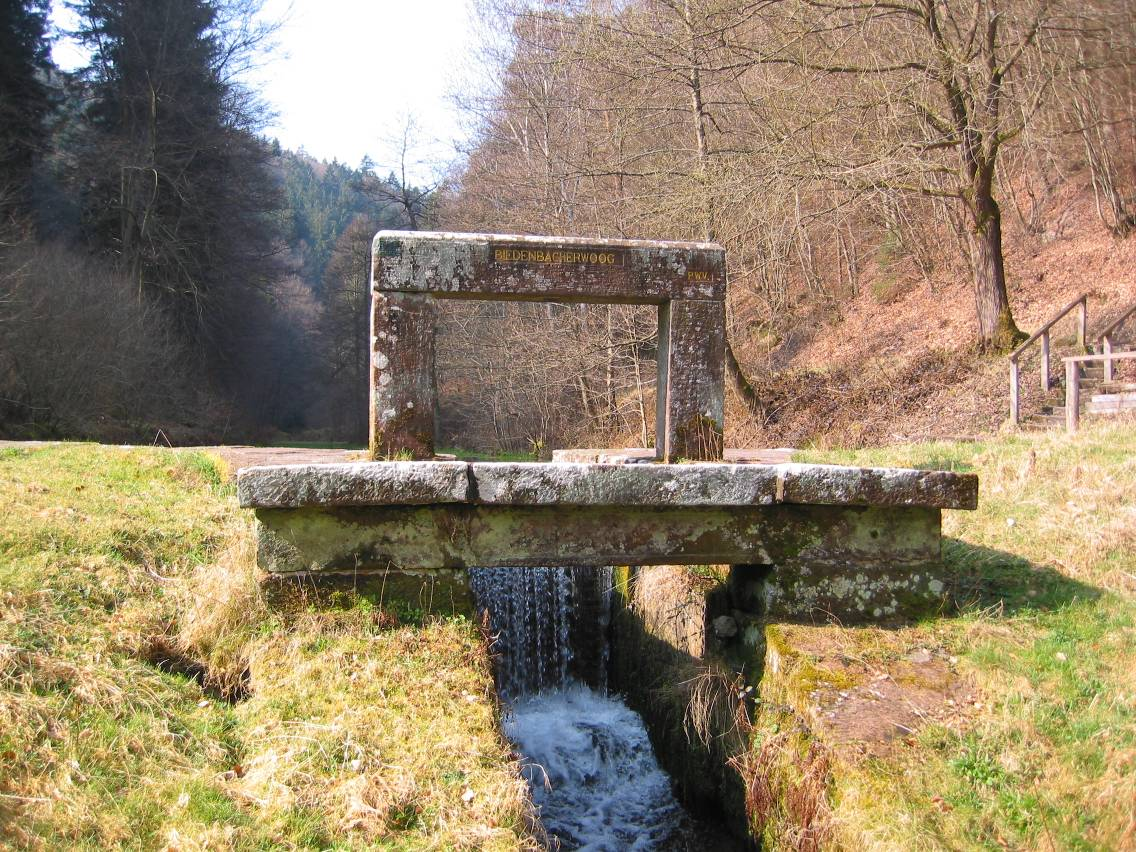 Ritterstein Nummer 156, Biedenbacherwoog